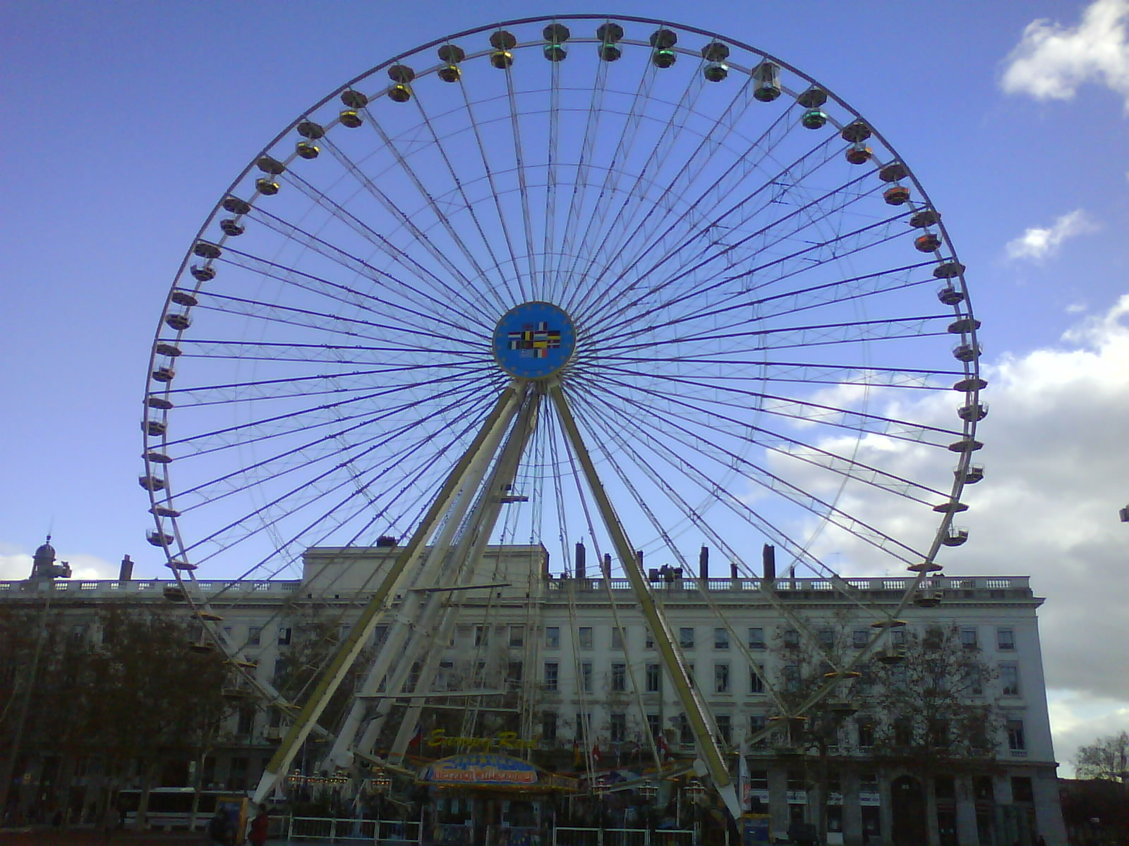 Grande roue sur la place Bellecour, 69002, Lyon, France